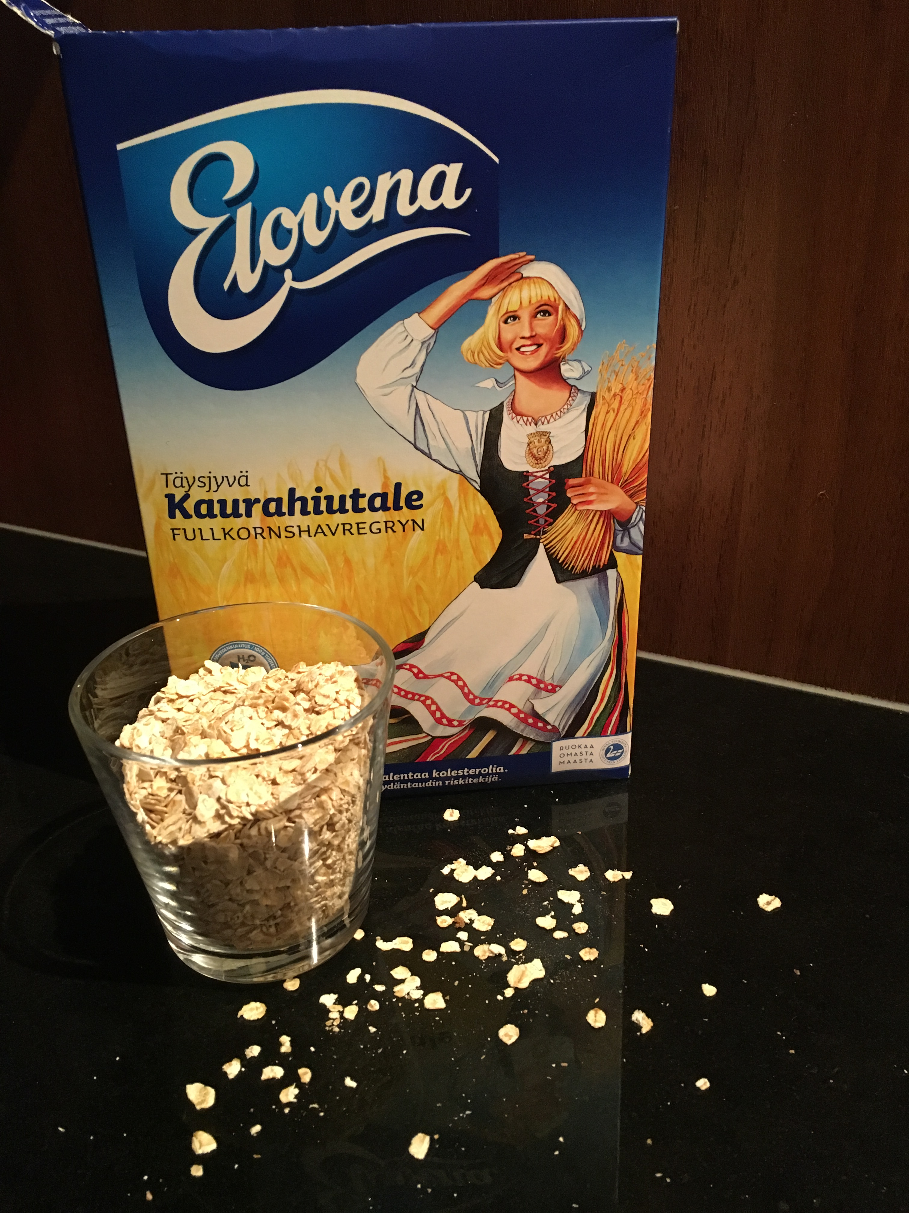 Elovena täysjyväkaurahiutaleita